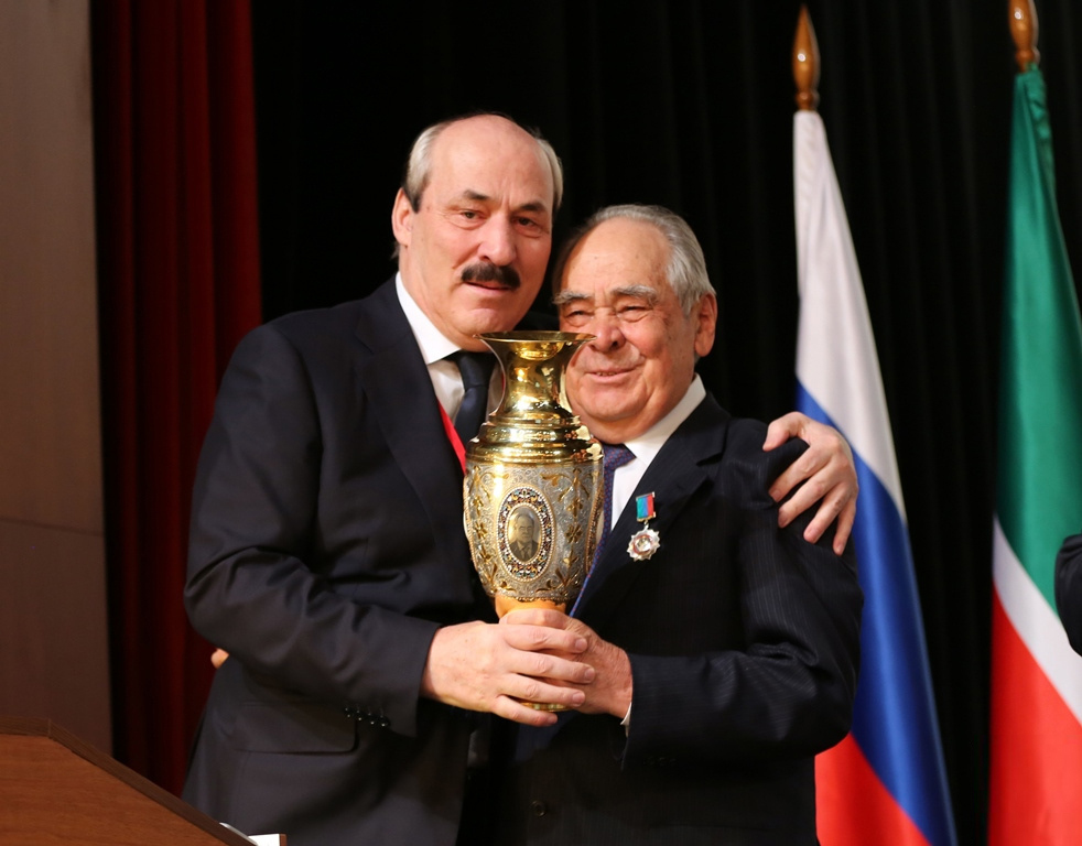 Глава Дагестана Рамазан Абдулатипов и первый Президент Татарстана Минтимер Шаймиев